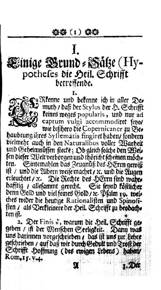 Scriptura S. Copernizans seu potius Astronomia Copernico-scripturaria bipartita = das ist: Ein gantz neu-und sehr curioser astronomischer Beweissthum des Copernicanischen Welt-Genaudes aus H. Schrifft ... von Joahnn Jacob Zimmermann philo-mathematico. - [Bayreuth?] : [s.n.], [post 1709?]. - [12], 105, [13] p., [3] c. di tav. : ill. ; 8º. - Data di pubblicazione dalla lettera di dedica. . [1]